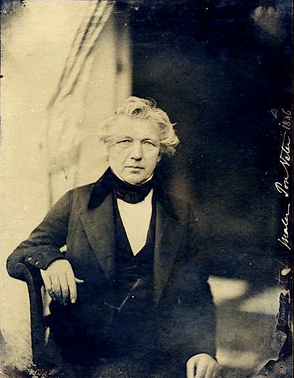 Людвиг Позе. Позитивное изображение с соляного негатива 1848 года. Негатив хранится в архиве городского музея Дюссельдорфа.